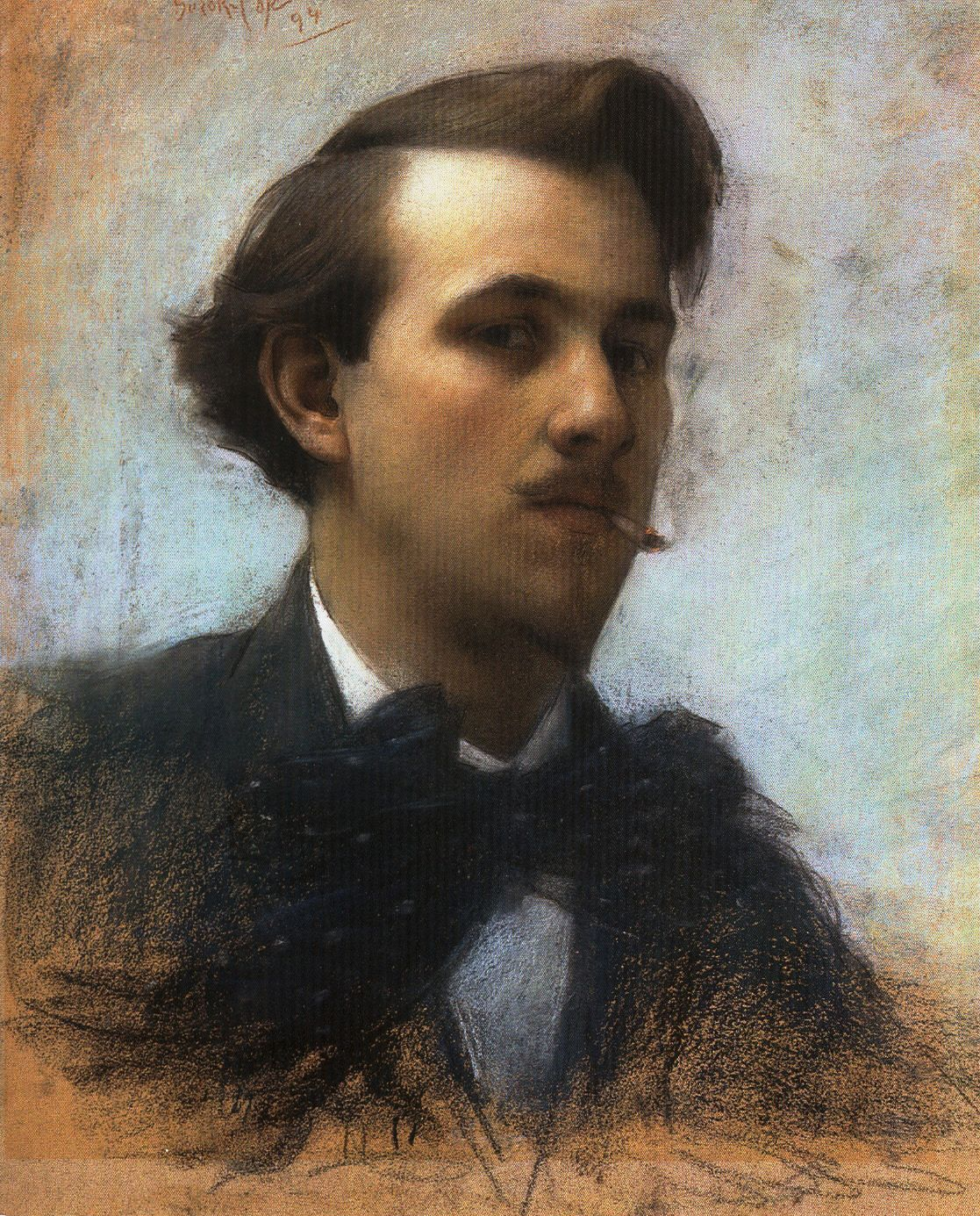 Self-portrait